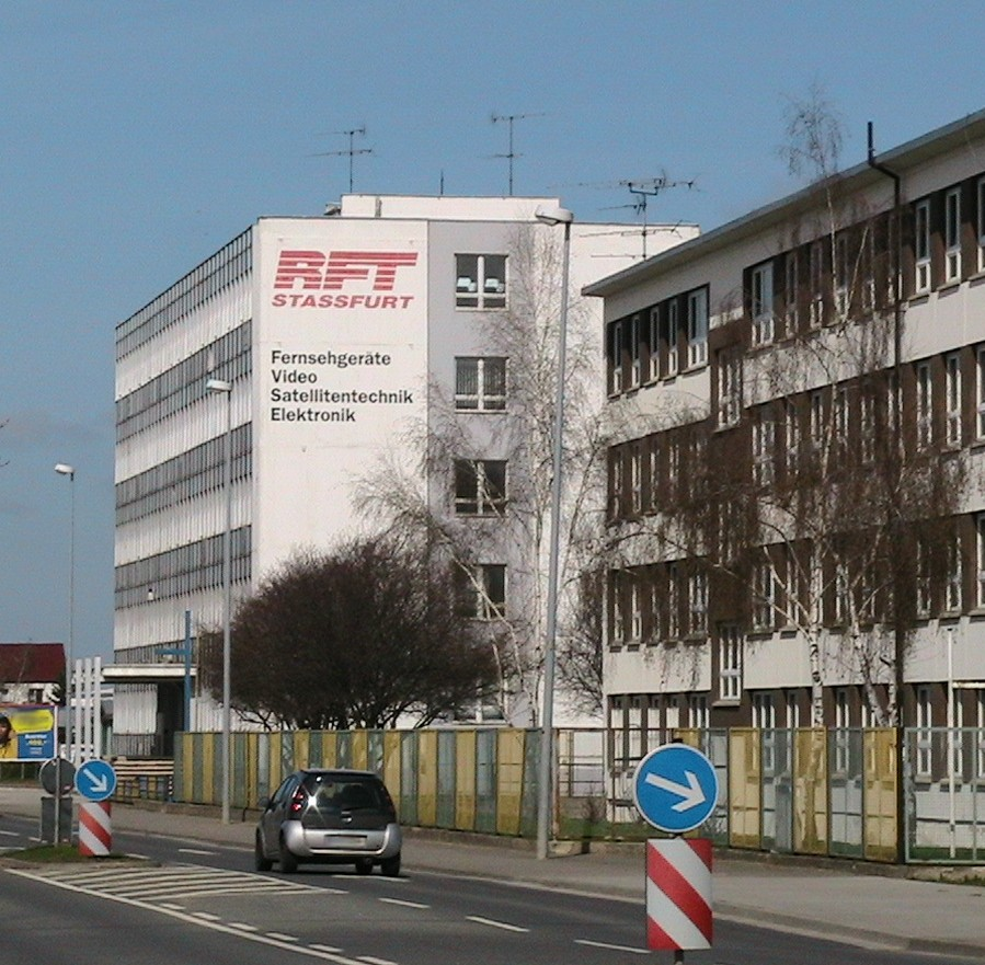 RFT in Staßfurt; Canon MVX250i (Fotofunktion) - Ausschnitt